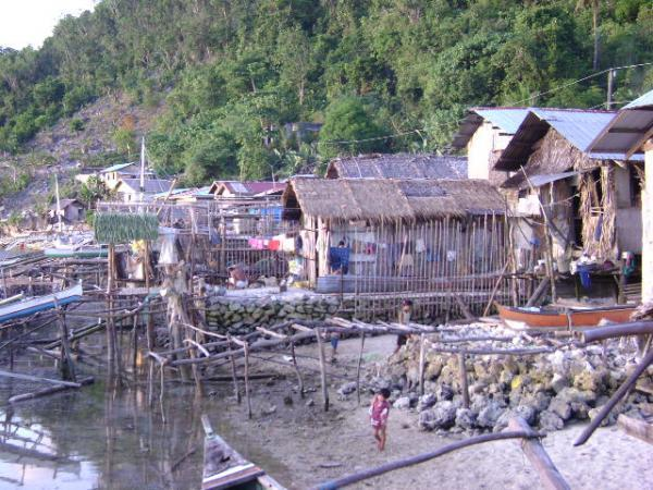 Magsaysay